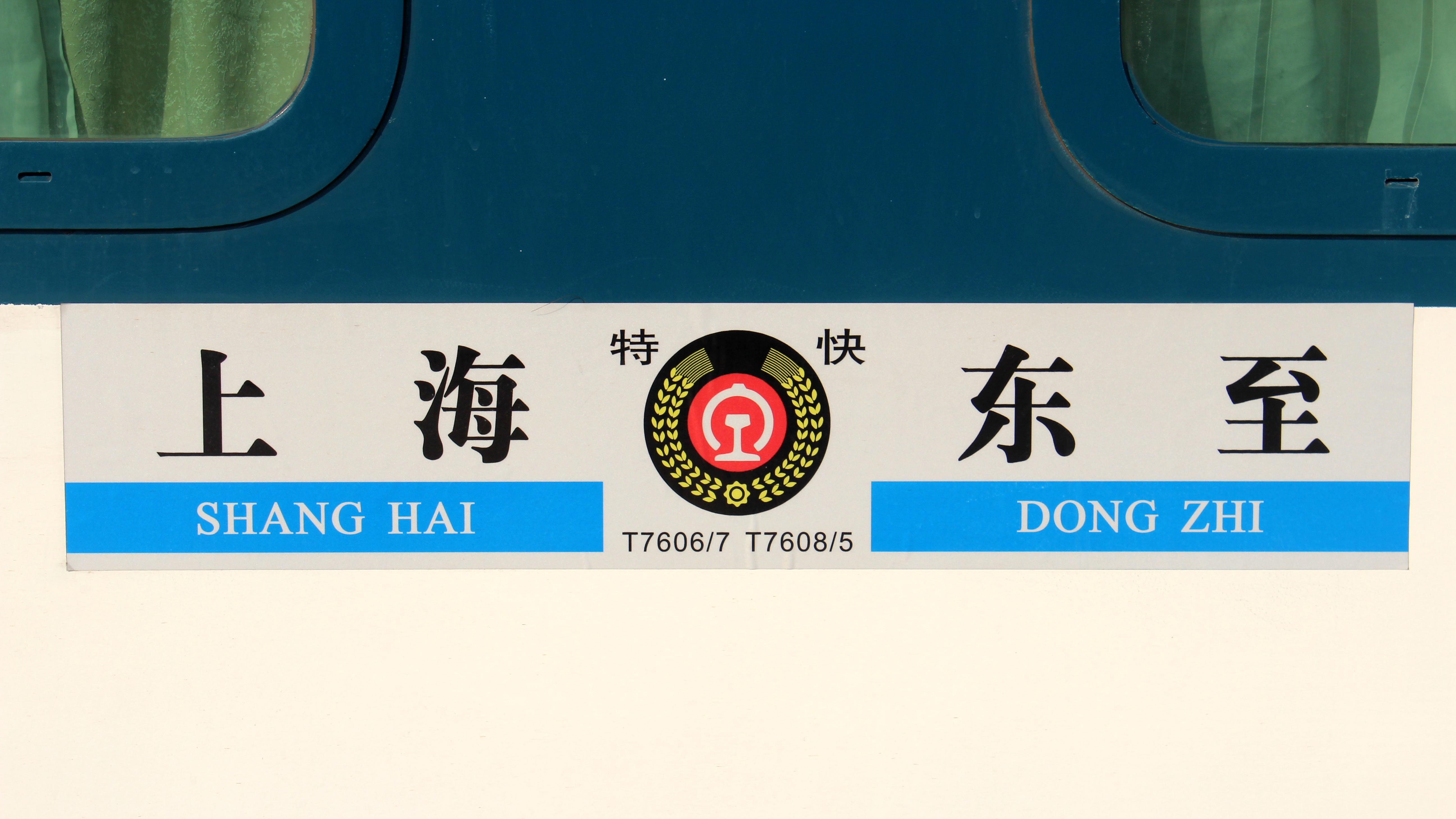 往返东至-上海的T7605/6/7/8次列车水牌。